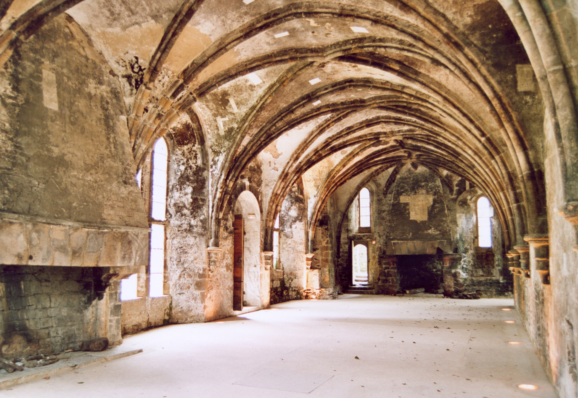 Bretagne Kérity Abbaye de Beauport Auteur : GIRAUD Patrick